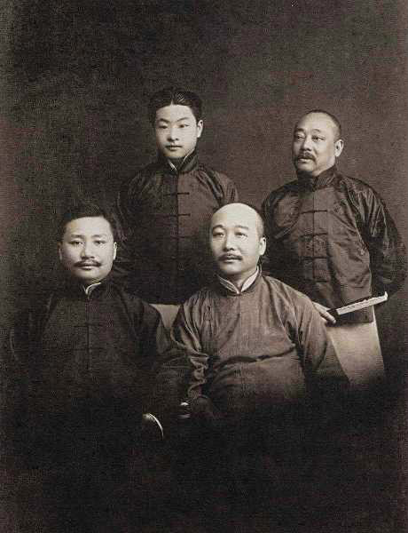 程砚秋与罗瘿公 李释戡 萧云亭(疑金仲荪)